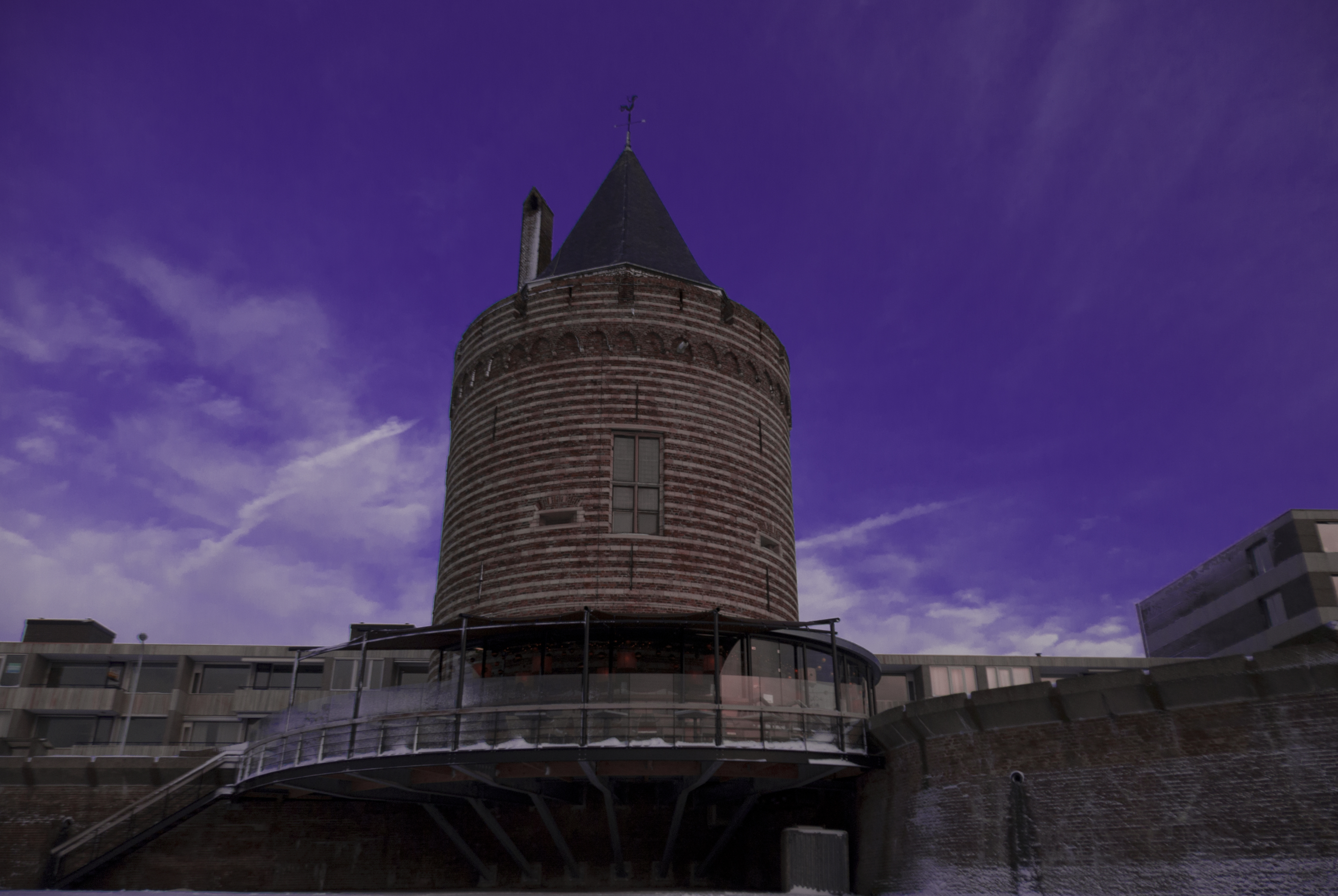 Gevangentoren, restant van voormalige Westpoort. Van 1895-1913 was hier de Oudheidskamer van Vlissingen gevestigd.